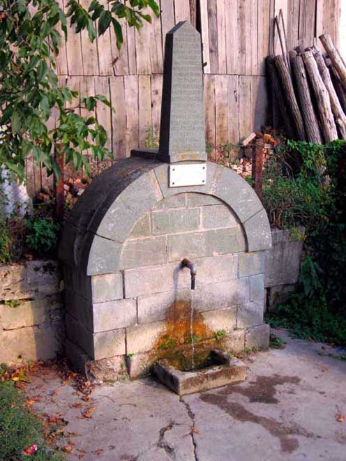 Česma u Beljini